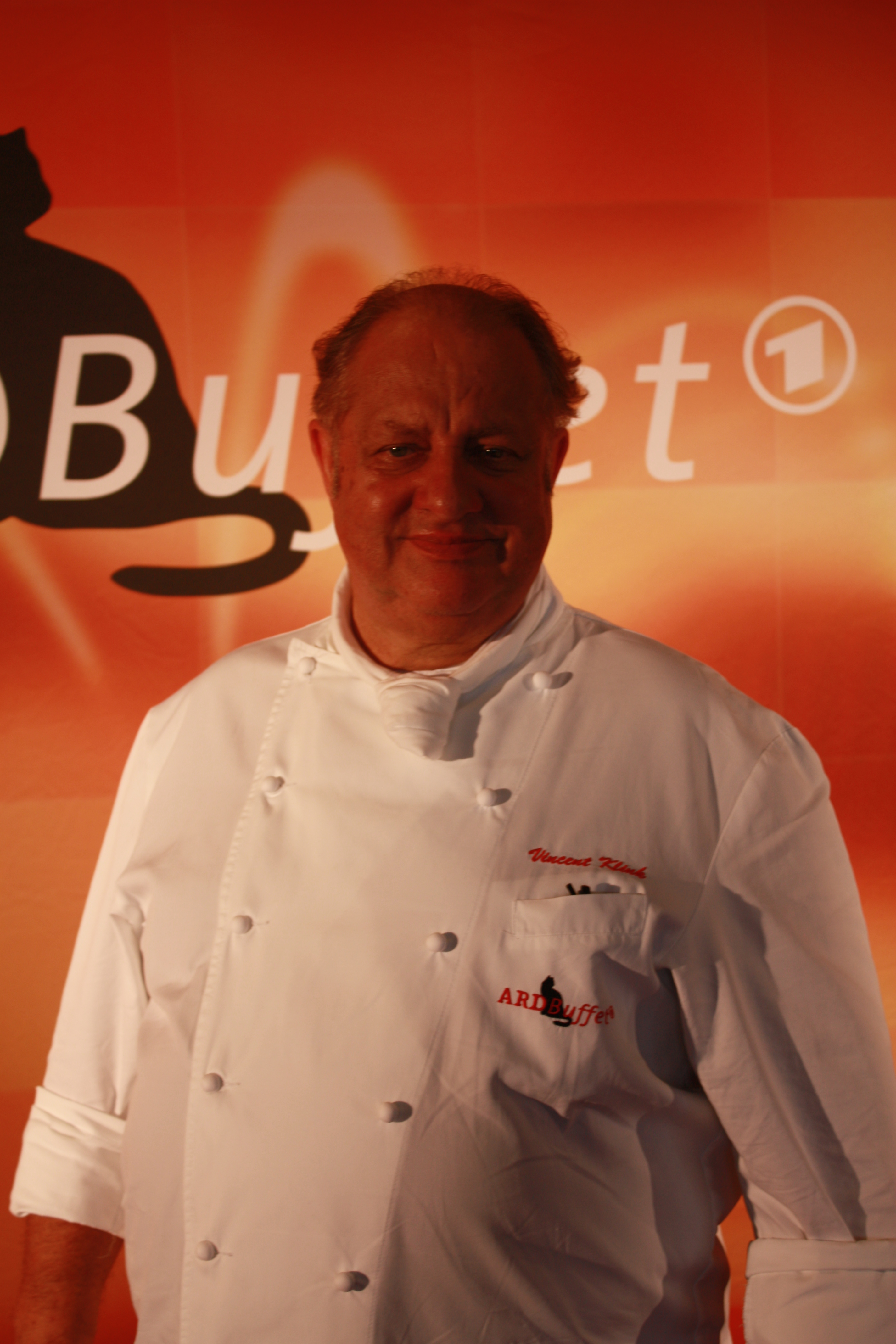 Internationale Funkausstellung 2012 , ARD-Buffet